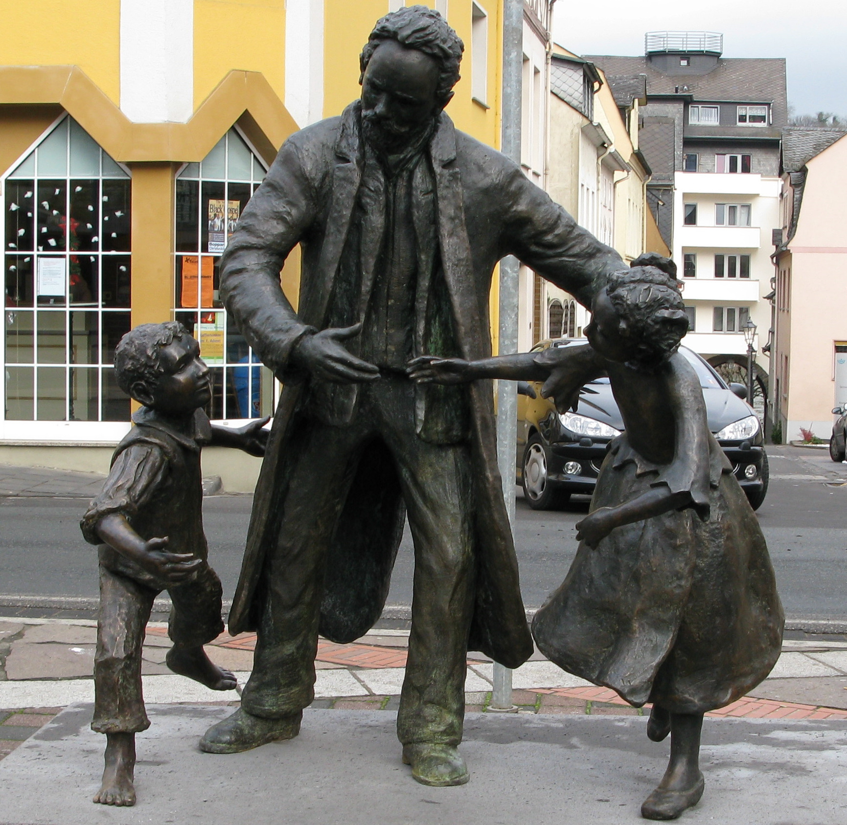 "Humperdinck", Bronze Skulpturengruppe, hergestellt 2010 von der Künstlerin Jutta Reiss